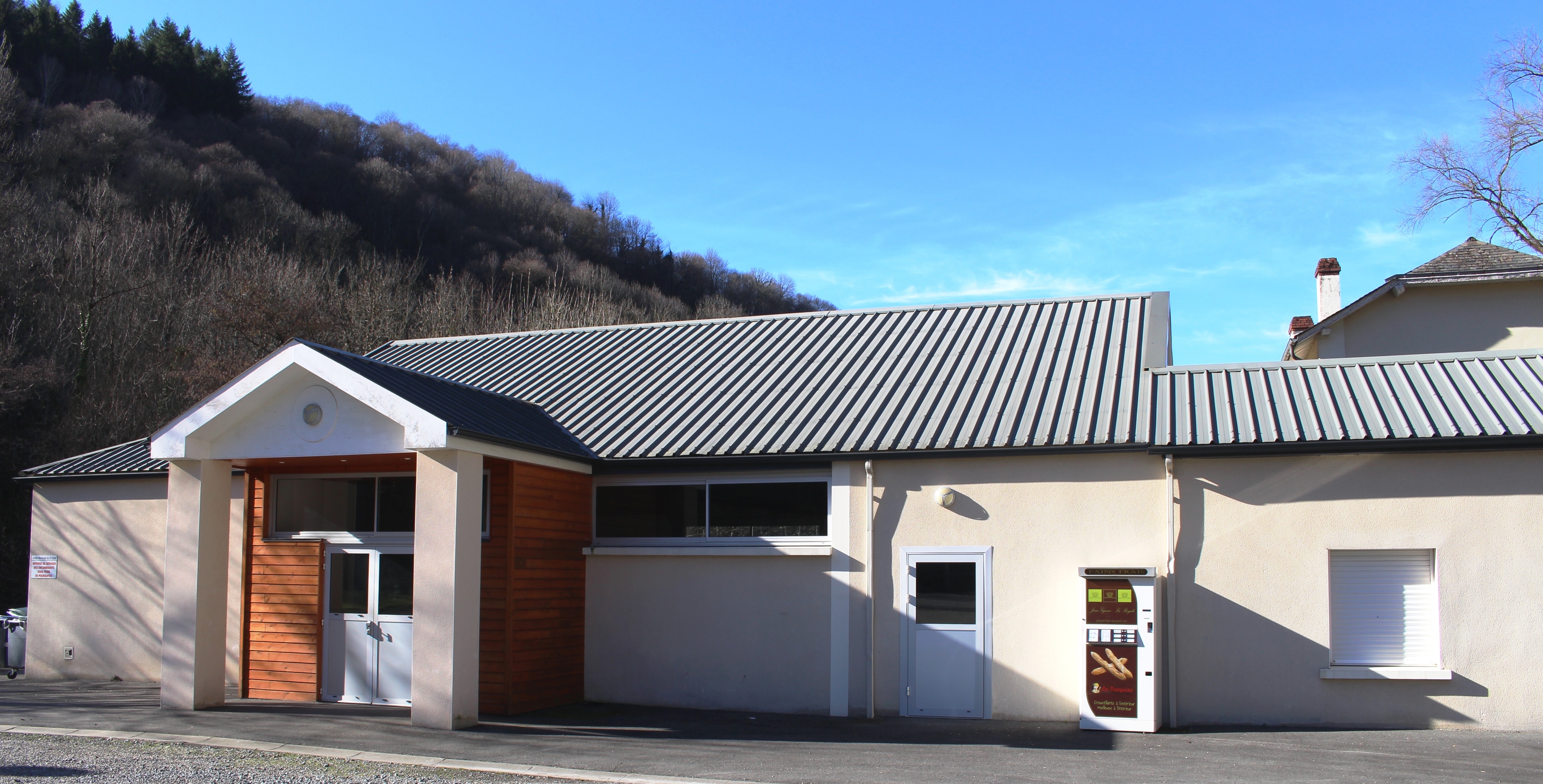 Salle des fêtes de Saint-Créac (Hautes-Pyrénées)